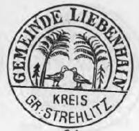 Altes Siegel des Ortes Liebenhain im Kreis Groß Strehlitz, Schlesien.